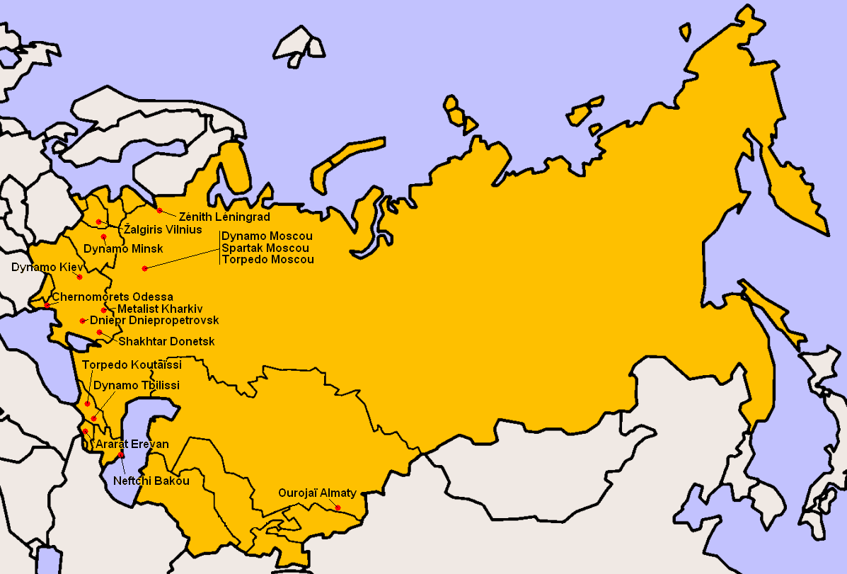 Clubs participants à la Division Supérieure 1986.